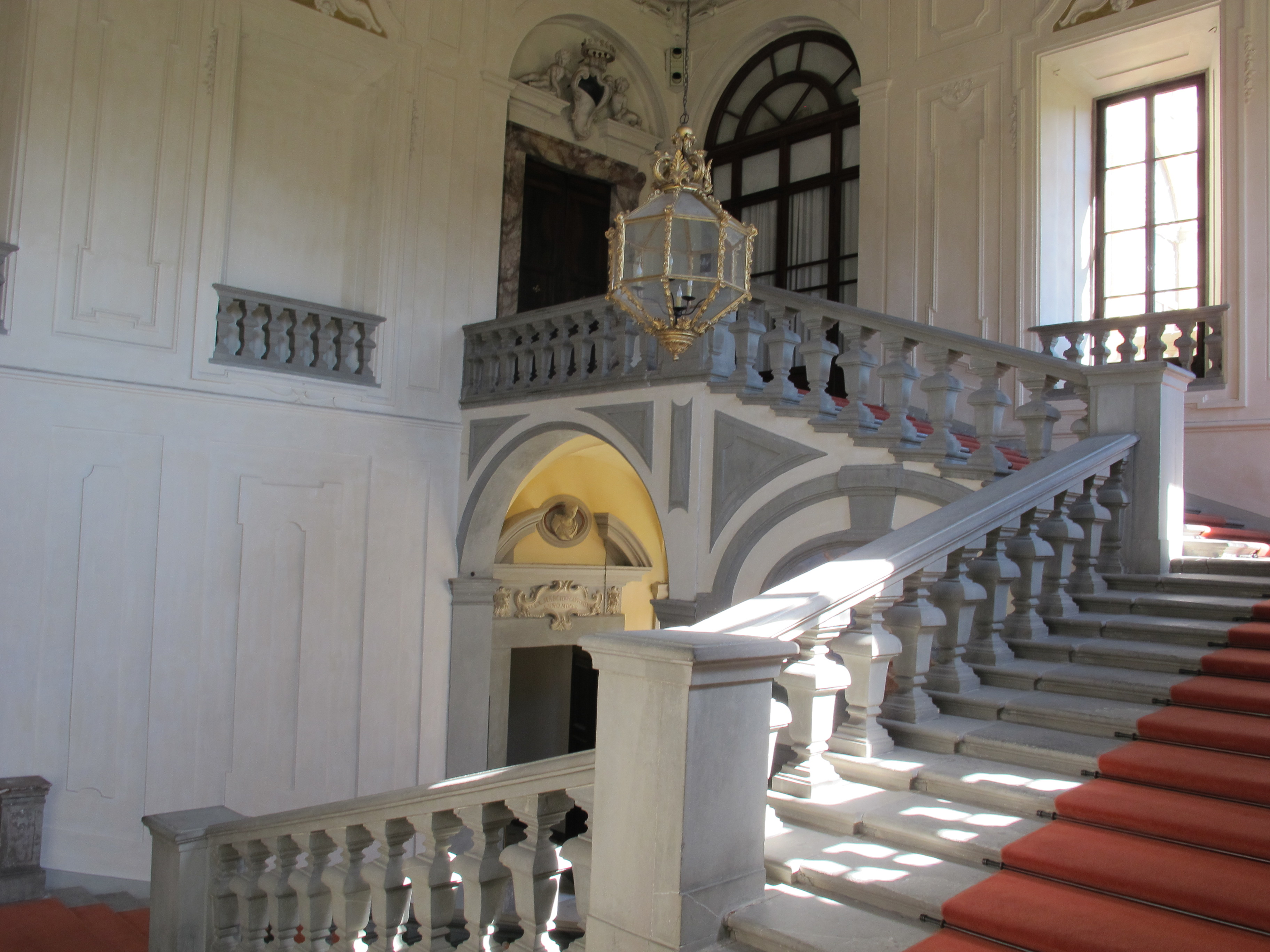 Palazzo di gino capponi, scalone monumentale